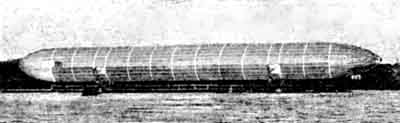 Zeppeliner (luftskib)